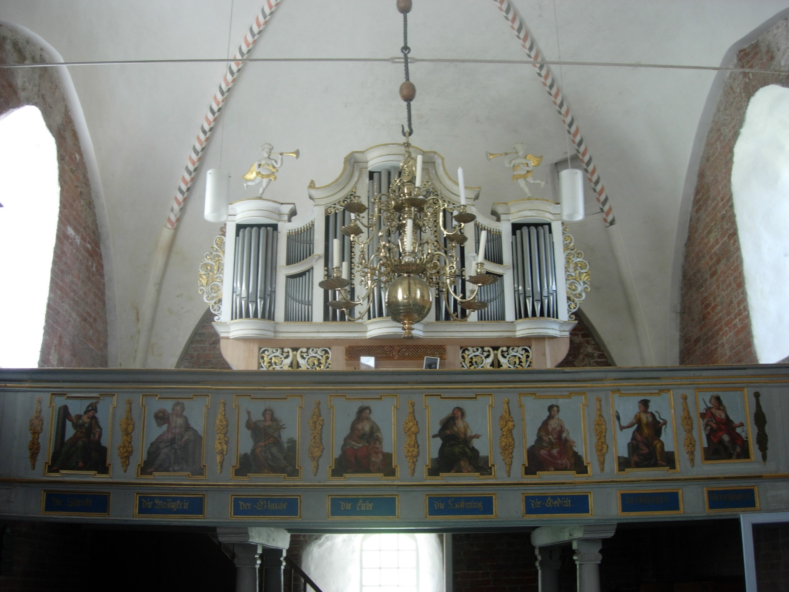 Orgel in Westeraccum